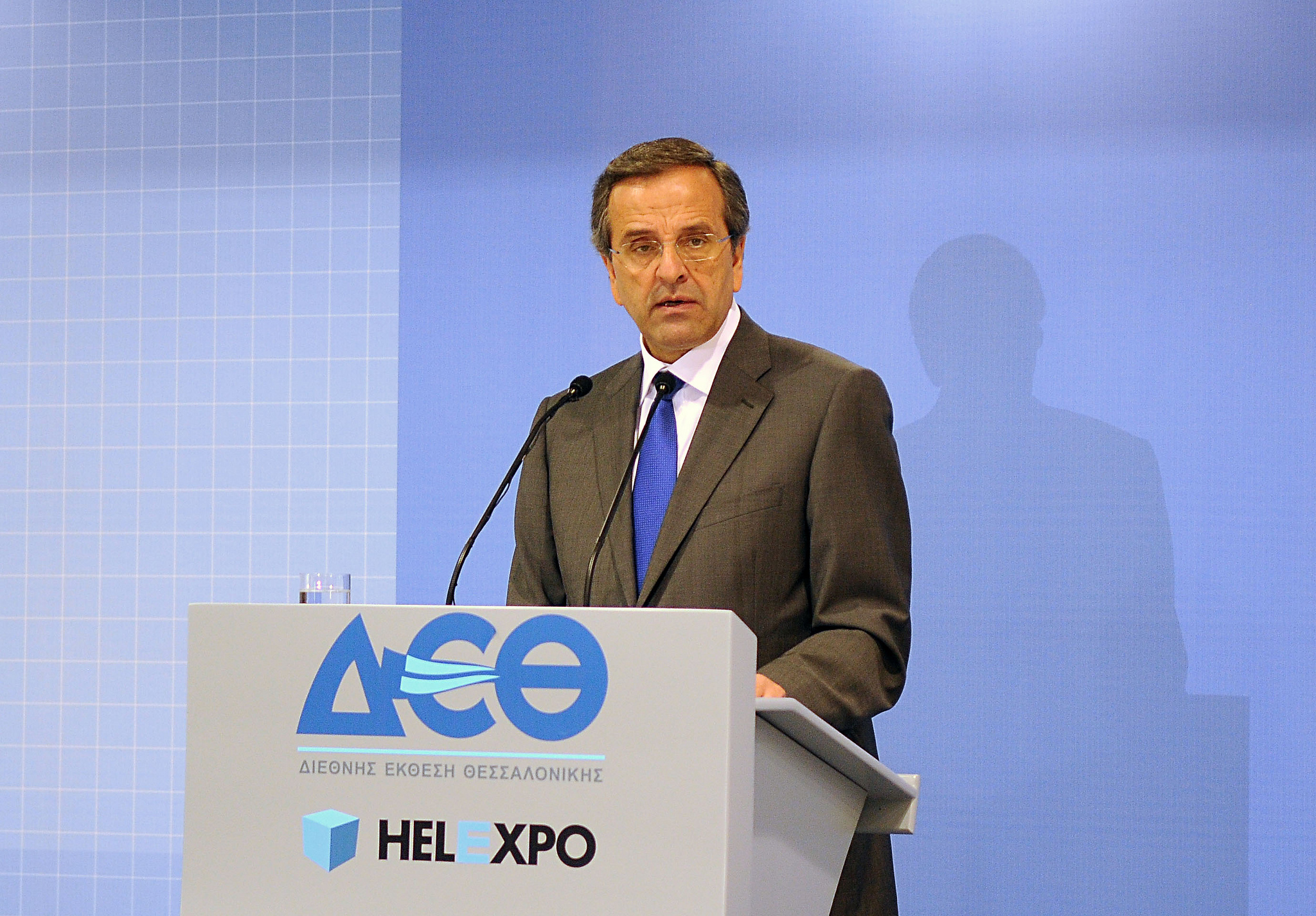 Αντώνης Σαμαράς - 77η Διεθνής Έκθεση Θεσσαλονίκης